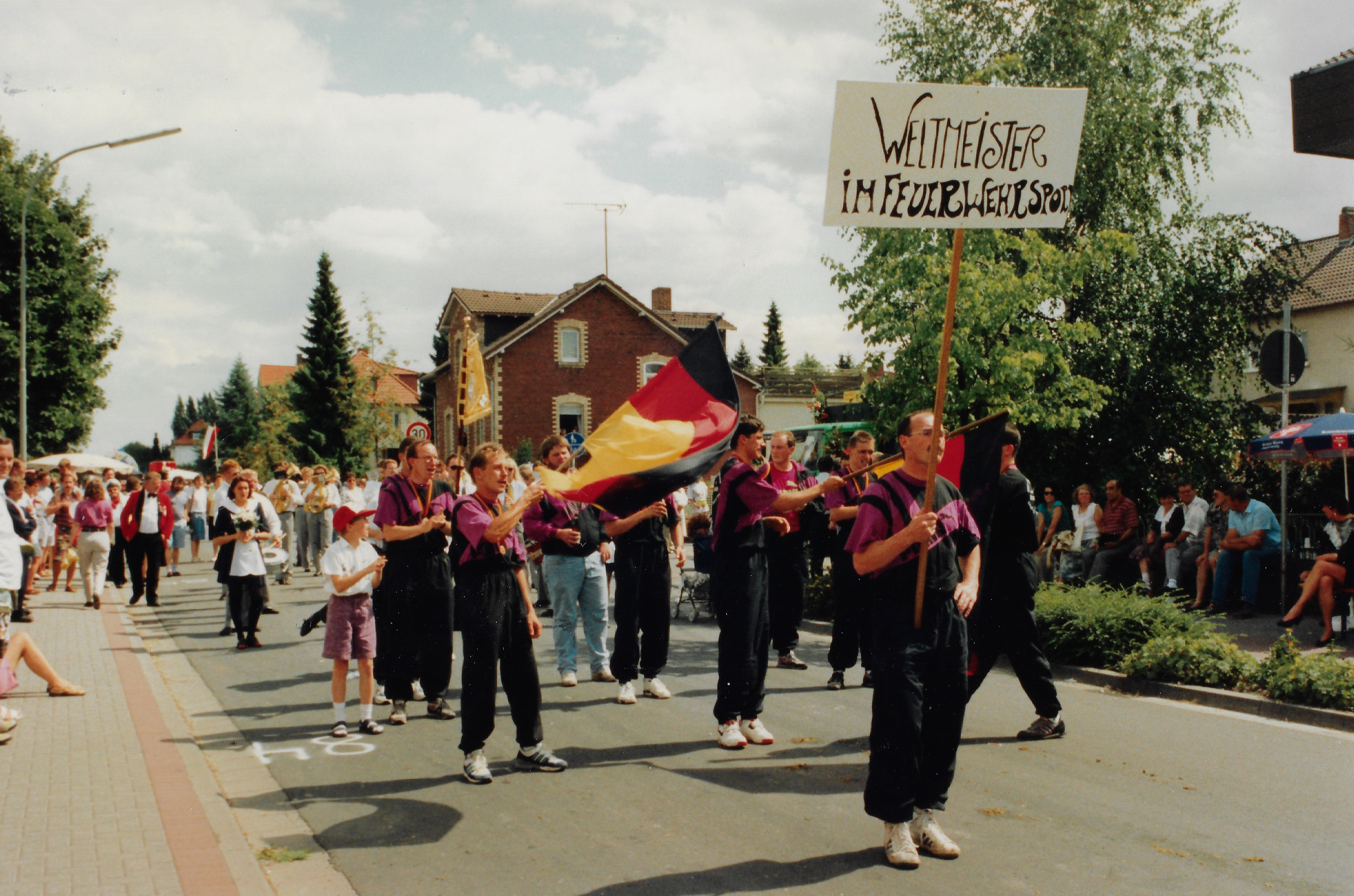 Hessentag 1993 in Lich - Festumzug mit den frischgebackenen Weltmeistern im Löschangriff der Freiwillige Feuerwehr Beselich-Obertiefenbach